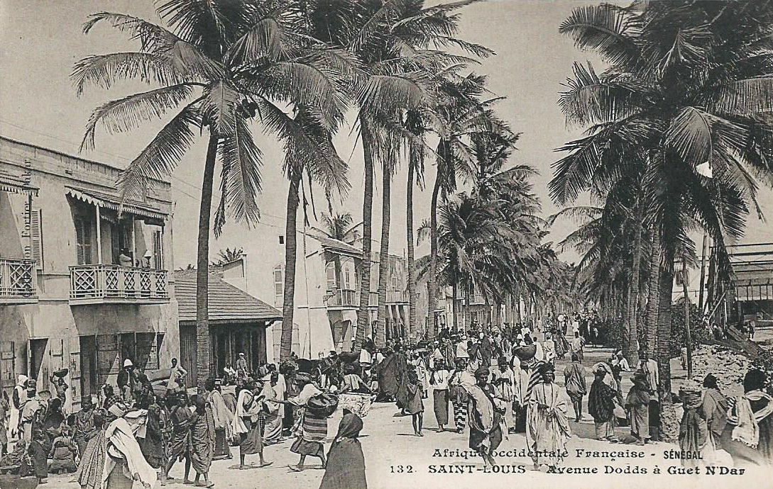 François-Edmond Fortier, Sénégal. Saint-Louis. Avenue Dodds à Guet N'Dar. Afrique Occidentale. Sénégal